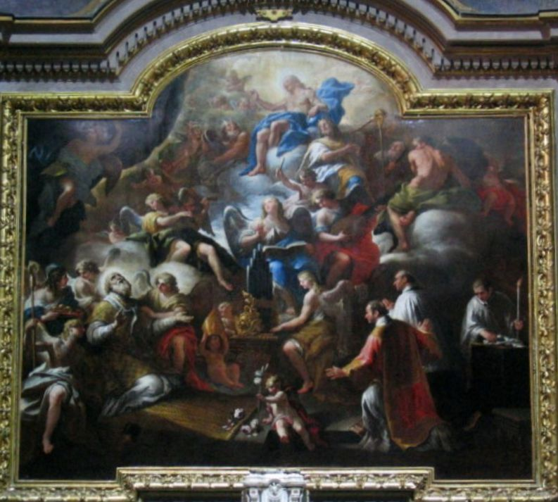 17 mq